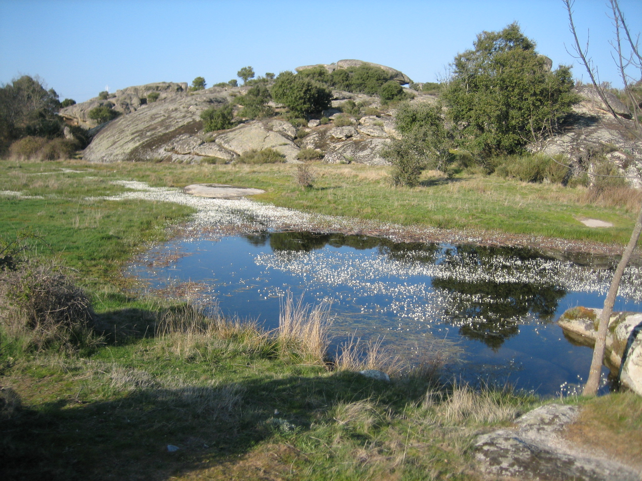 Ribera de Tudera –Zamora–.